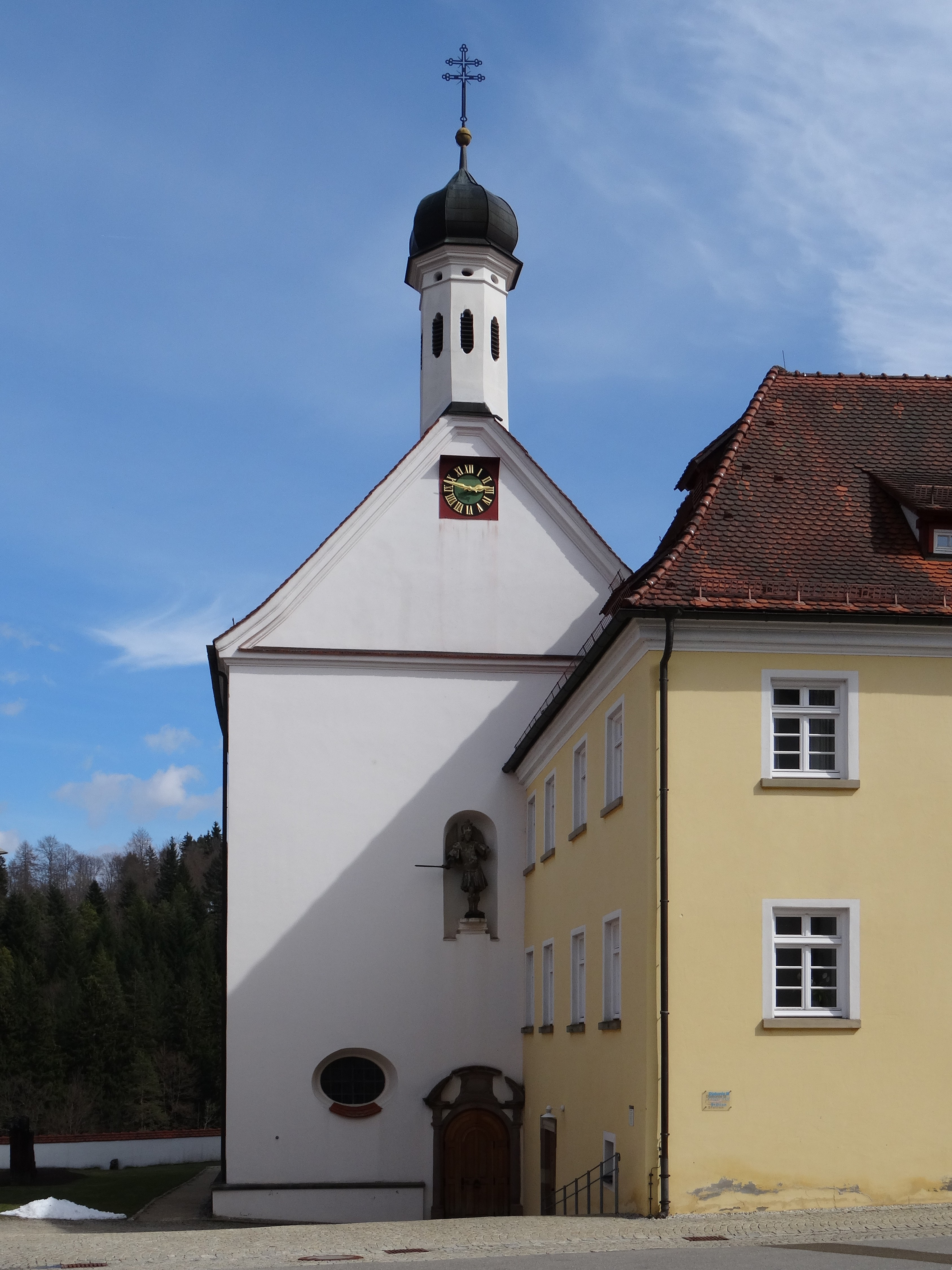 Eingang und Westseite der (ehemaligen) Klosterkirche Mariaberg. Heute evangelische Kirche von Mariaberg.